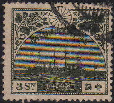 皇太子時代の昭和天皇が欧州諸国訪問から帰国されたのを記念して発行された記念切手のうち3銭切手。描かれているのは訪問に使用された戦艦「香取」と「鹿島」である。